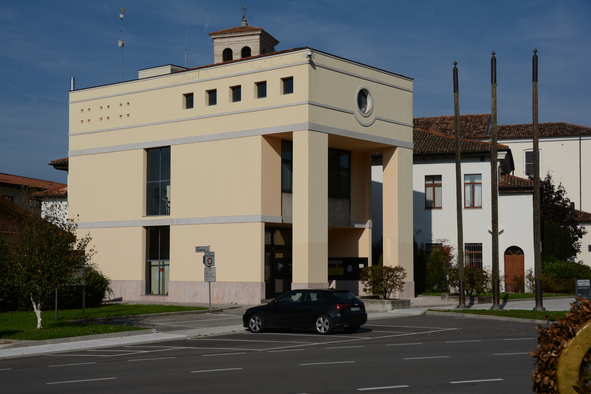 Via Antonio Romanò